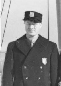 Bremen, Avery Brundage eingetroffen Scherl: Der Präsident des amerikanischen Olympia-Komitees in Deutschland eingetroffen. Mit dem Schnelldampfer "Bremen" des Norddeutschen Lloyd sind soeben der Präsident des amerikanischen Olympia-Komitees, Avery Brundage, sowie der Schatzmeister des Komitees Gustav Kirby und das Vorstandsmitglied Dietrich Wortmann zu den olympischen Spielen in Deutschland eingetroffen. Die Gäste wurden vom Senat der Hansestadt Bremen feierlich empfangen und mit einem Ehrentrunk begrüßt. V.l.n.r.: Avery Brundage, Kommodore Ziegenbein, der Führer der "Bremen", Gustav Kirby, und Dietrich Wortmann. 1416-36 [Vorbereitung der Olympischen Winterspiele in Garmisch-Partenkirchen] Abgebildete Personen: Brundage, Avery: Präsident des Internationalen Olympischen Komitees (IOC), USA (GND 118516078) Kirby, Gustav: Schatzmeister des Olympischen Komitees, USA Ziegenbein, Leopold: Kapitän des Schnelldampfers Bremen, Kommodore, Deutschland Information added by Wikimedia users.:w:de:Leopold Ziegenbein (GND 124981992)